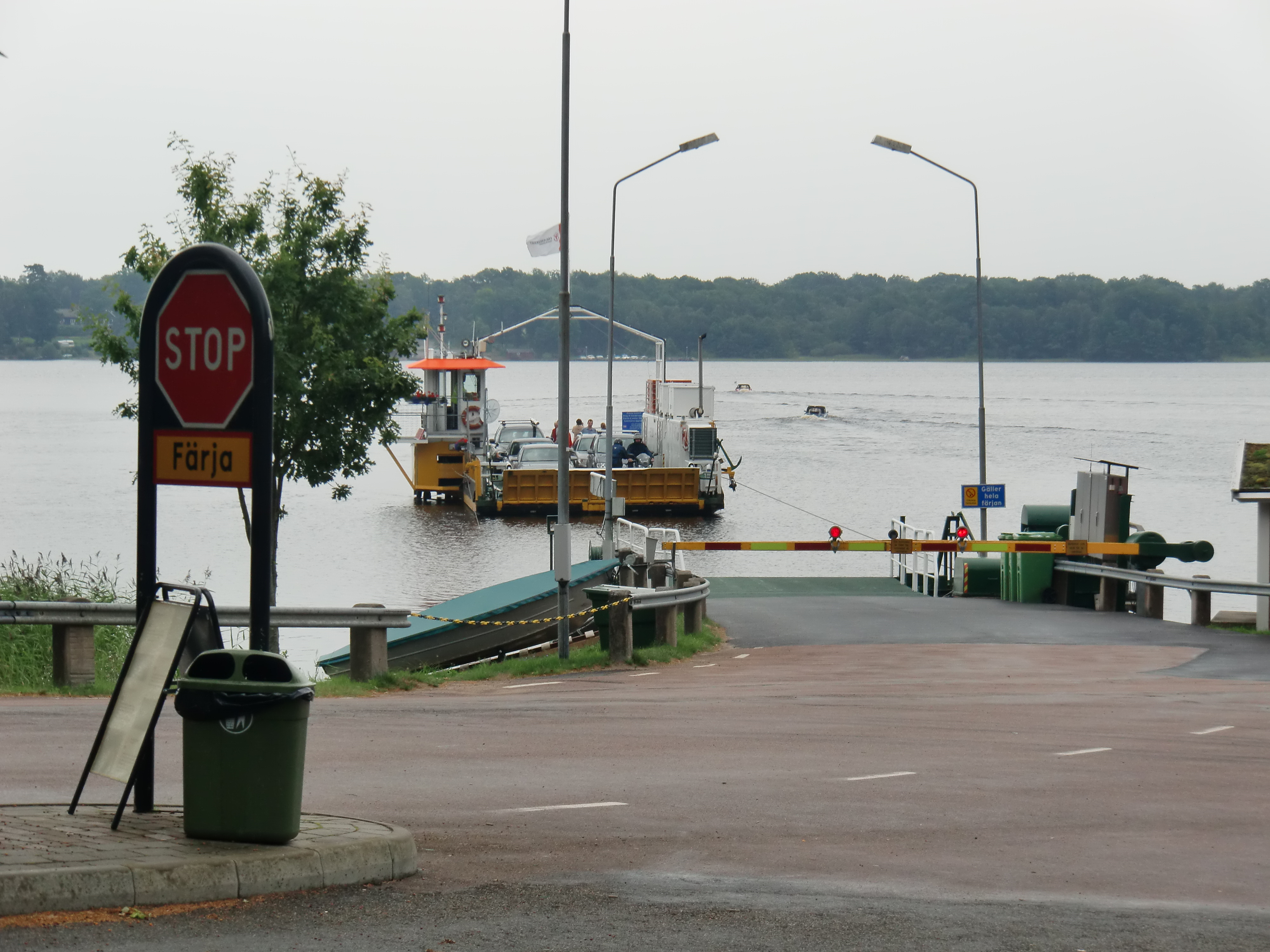 Seilfähre vom Festland zur Insel Bolmsö, Festlandseite